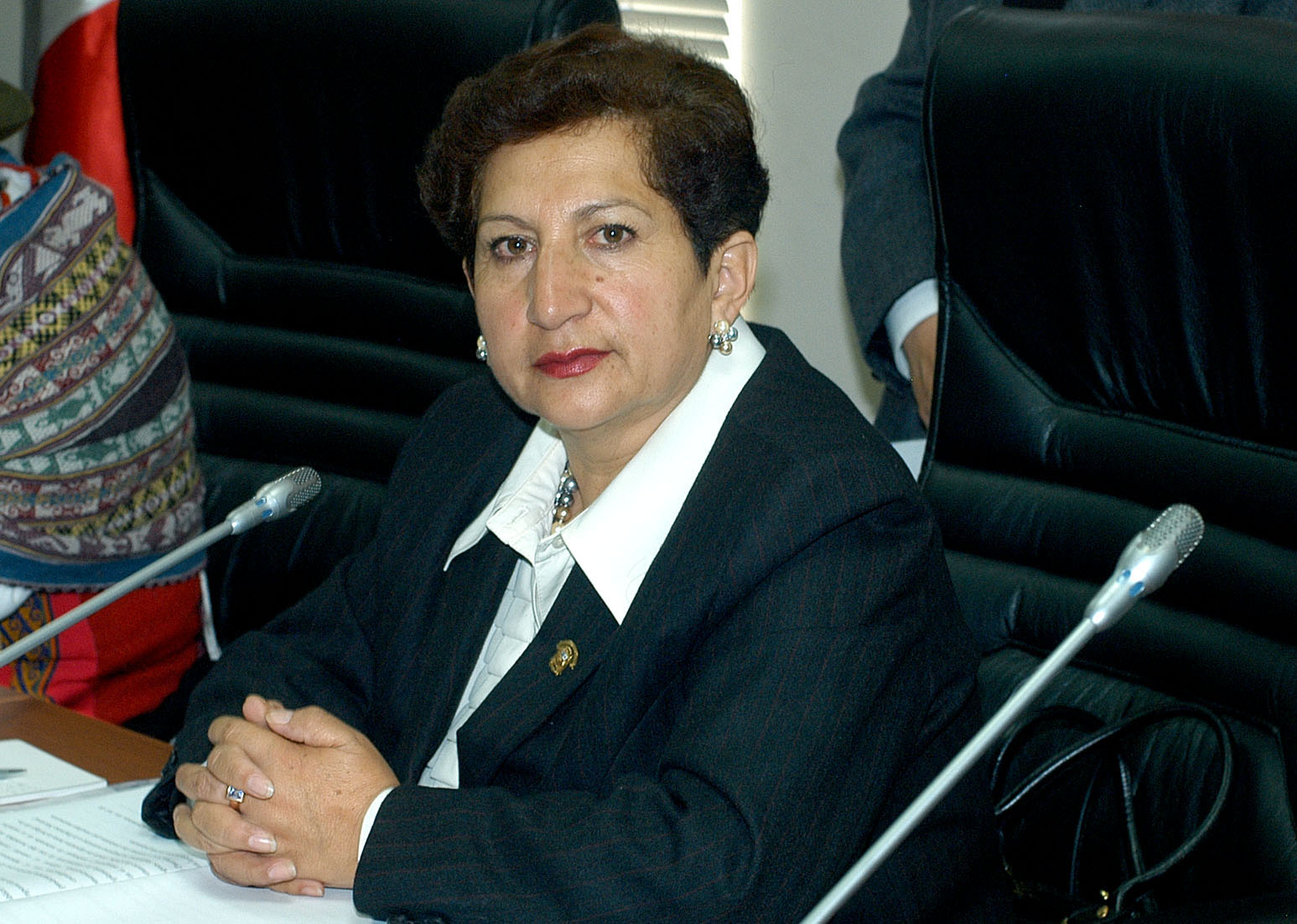 La legisladora Elizabeth León (BPCD), presidenta de la comisión especial encargada de celebrar los cien años de José María Arguedas planteó difundir y revalorar la obra del autor.